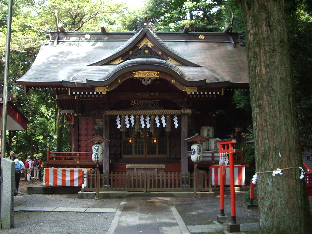 Anazawa Tenjinja, a Shinto Shrine in Inagi, Tokyo, Japan.